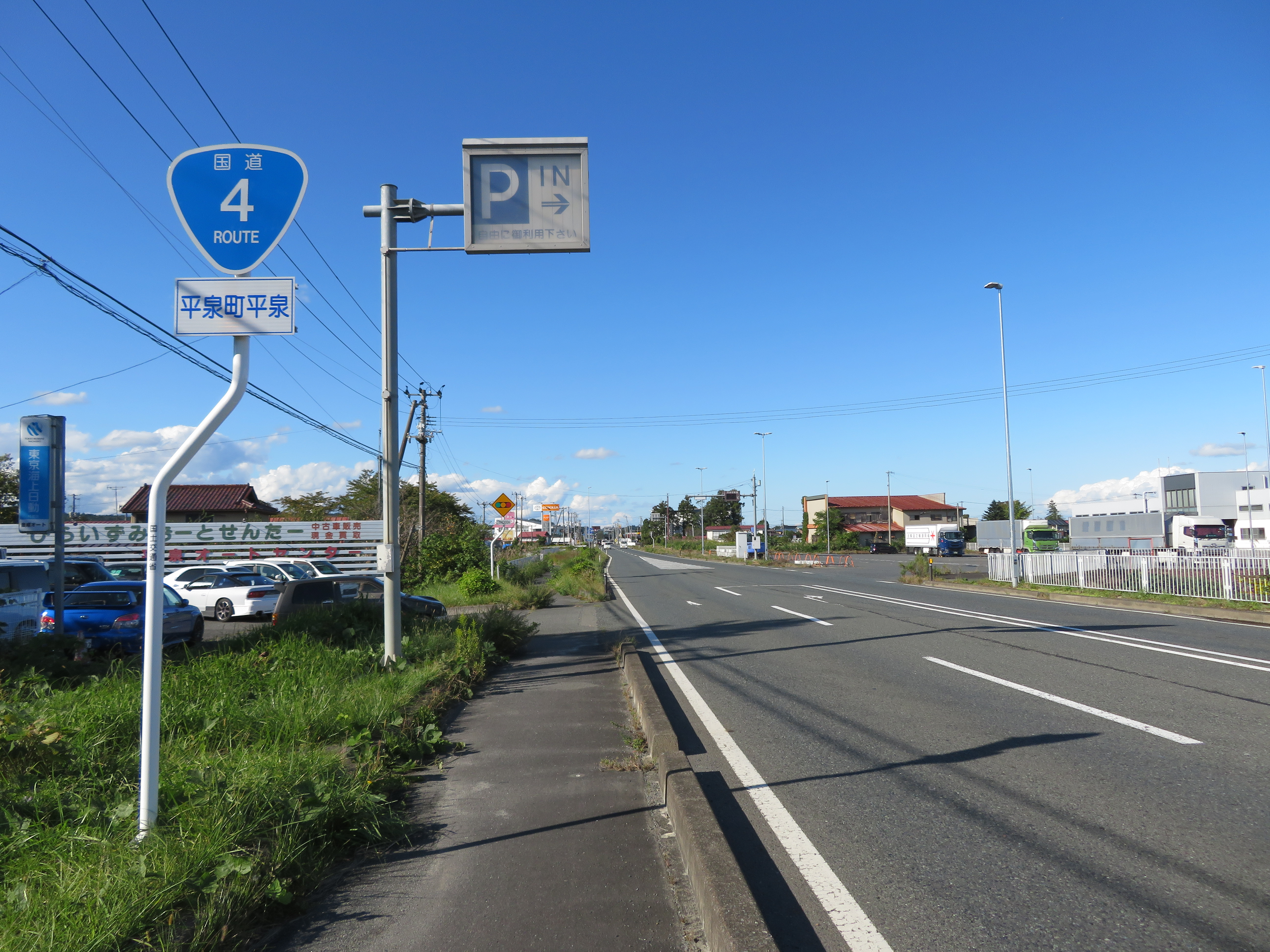 国道4号一関バイパス 岩手県平泉町平泉付近（前沢方面を撮影）